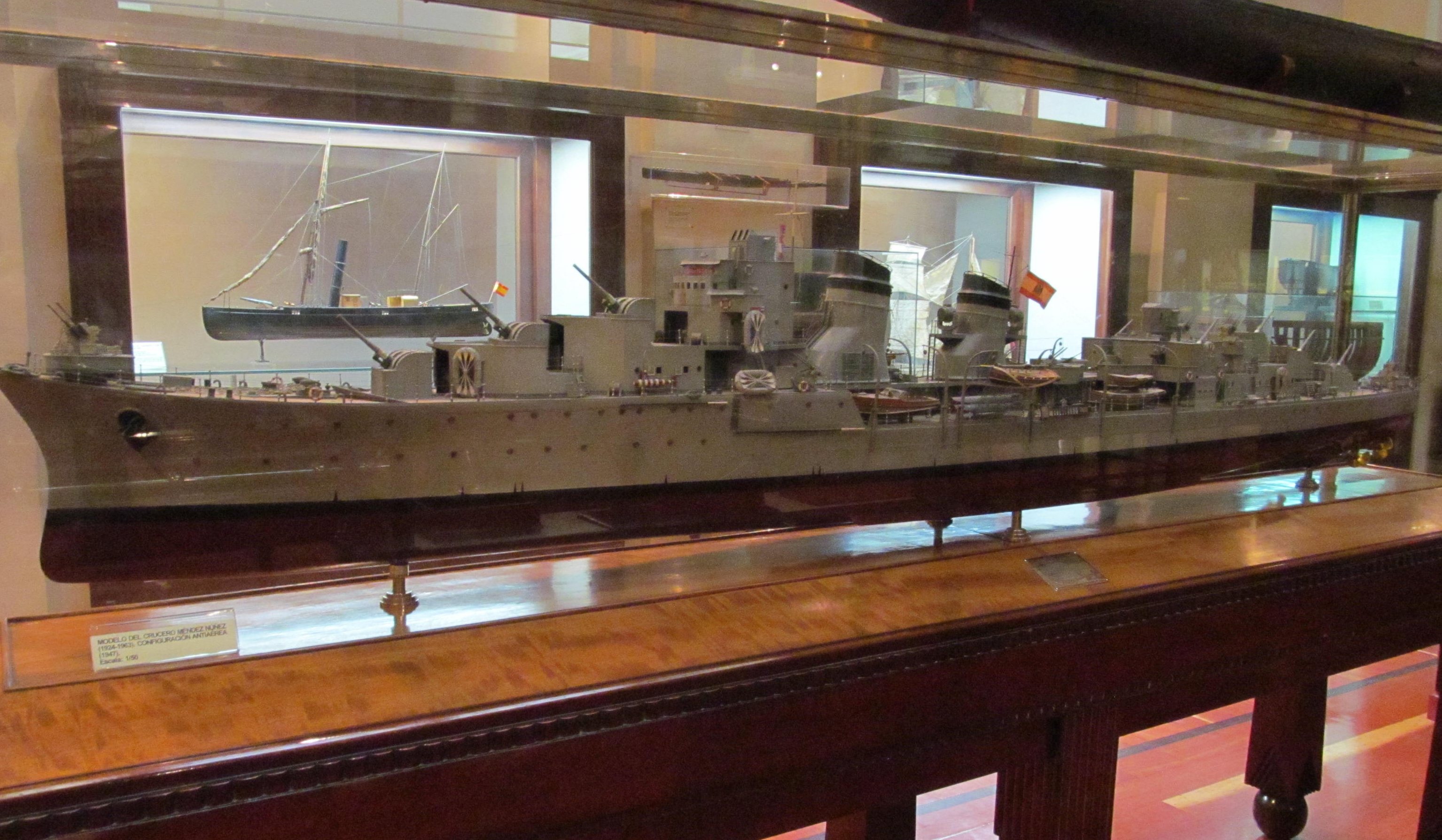 La maqueta del crucero ligero Méndez Núñez (1924-1963) en el Museo Naval, Madrid.